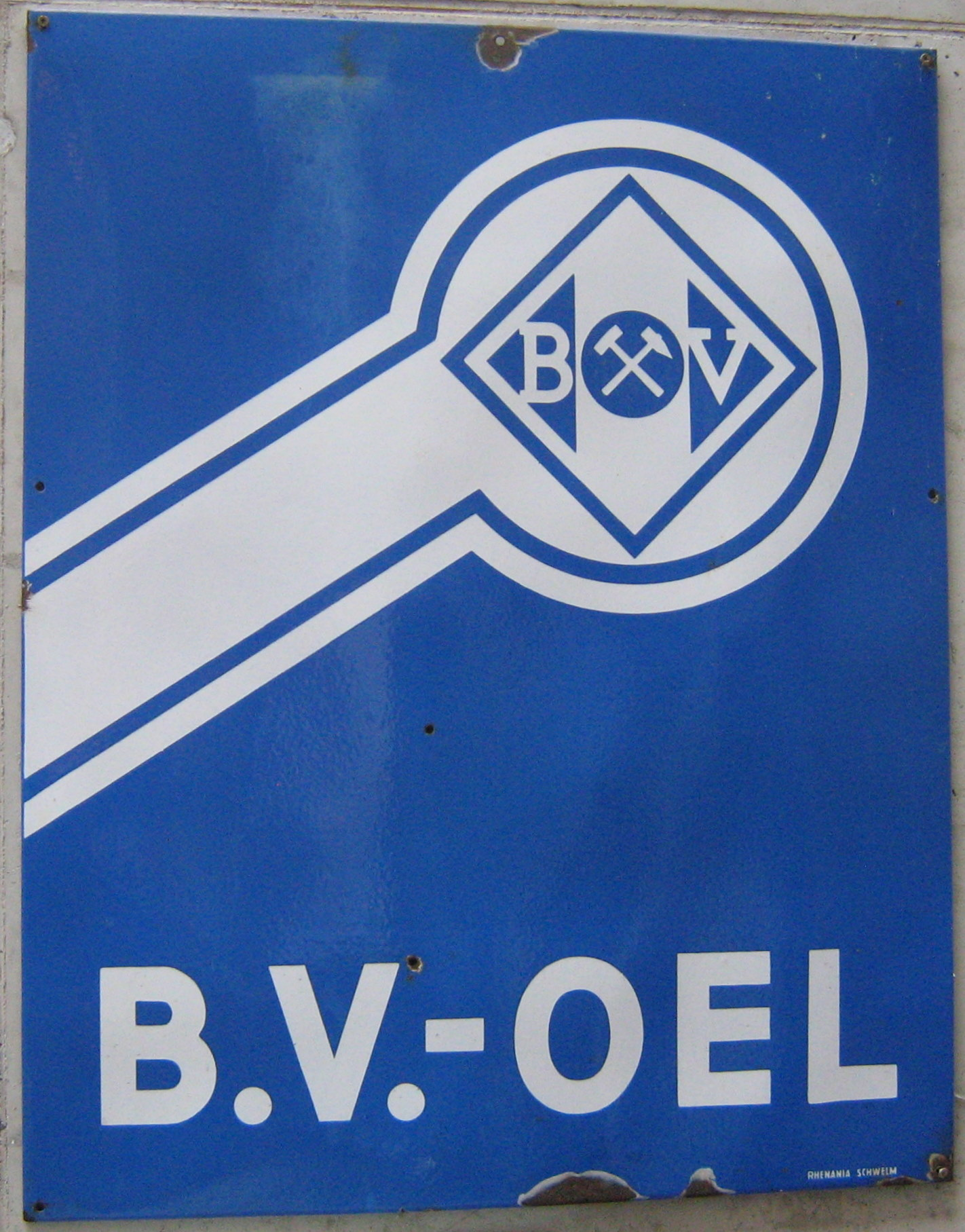 alte B.V.-Oel-Tafel (Aral)